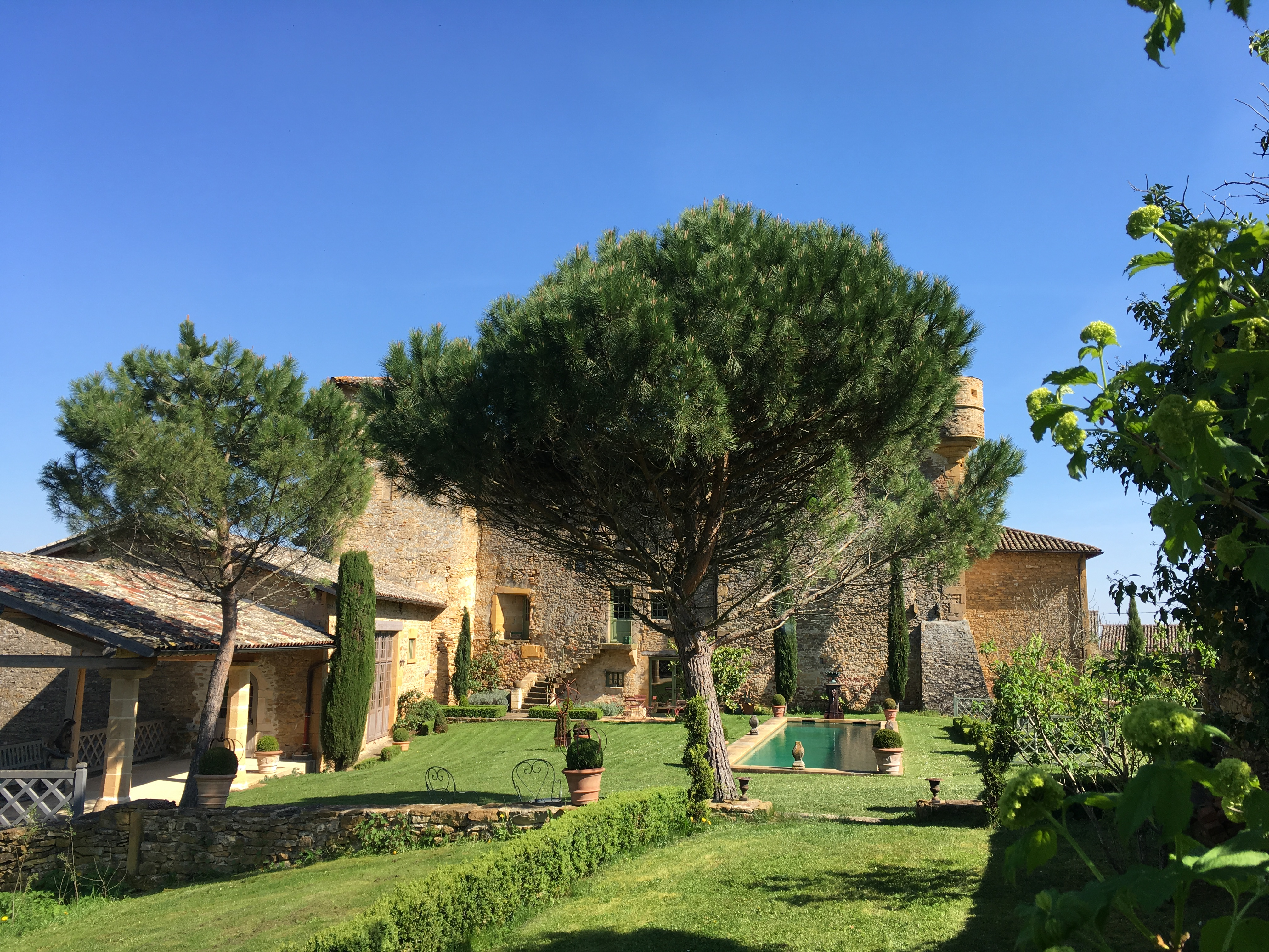 etat du jardin en 2018